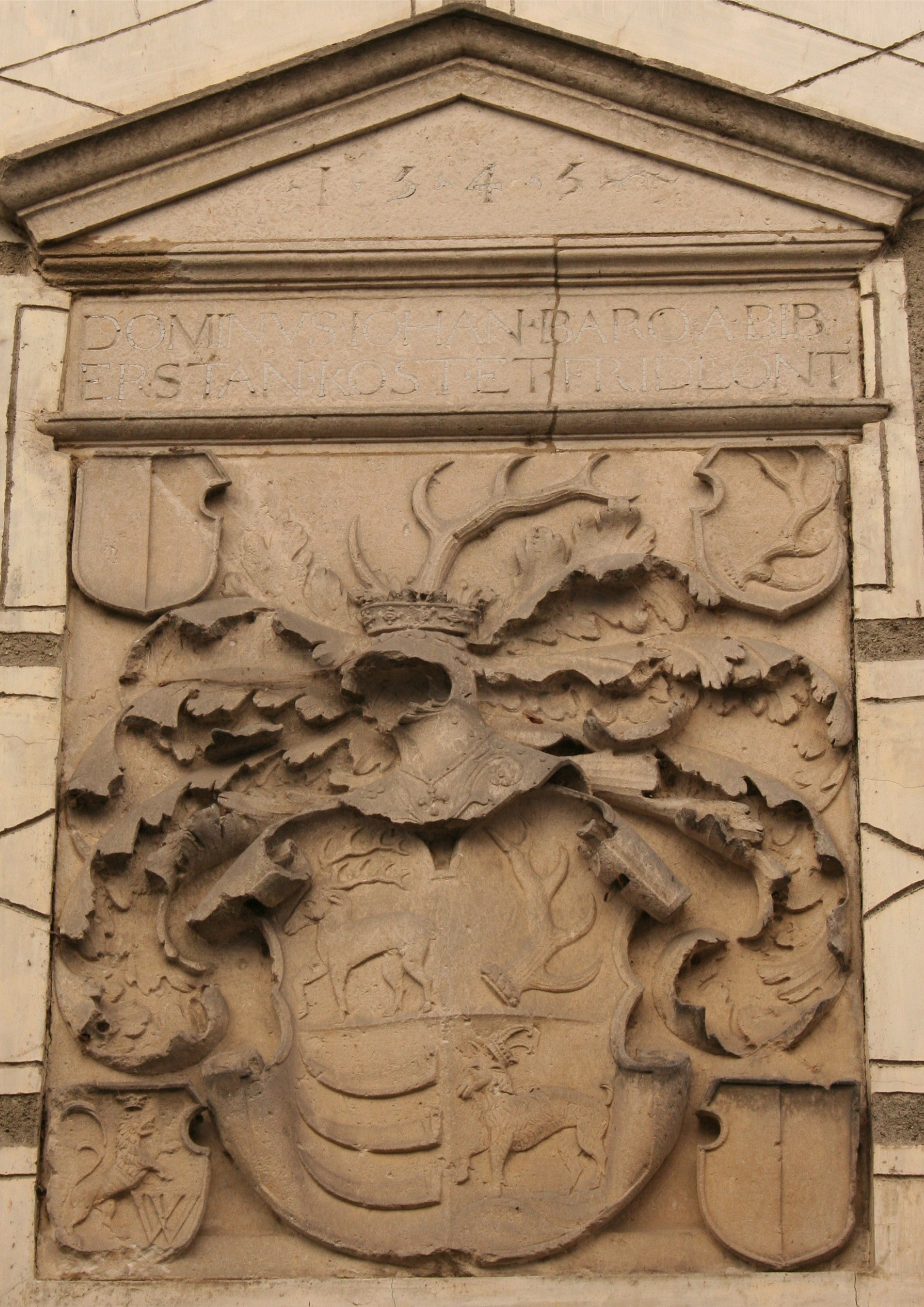 Sandsteinwappen der Edlen Herren von Bieberstein aus der Burg Kost in Böhmen von 1545. Die drei Brüder Johann (+1550), Christoph (+1561) und Hieronymus (+1649) von Biberstein setzten alle für kurze Zeit dieses große Herrschaftswappen neben ihre Epitaphe in der Dekanalskirche in Friedland (Böhmen).